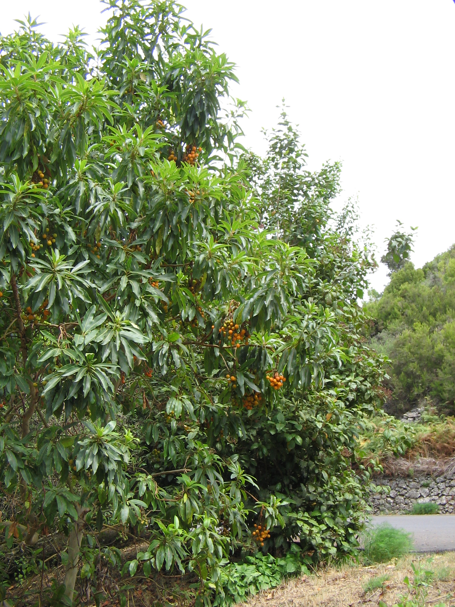 Arbutus canariensis en fruits, photographié à La Palma